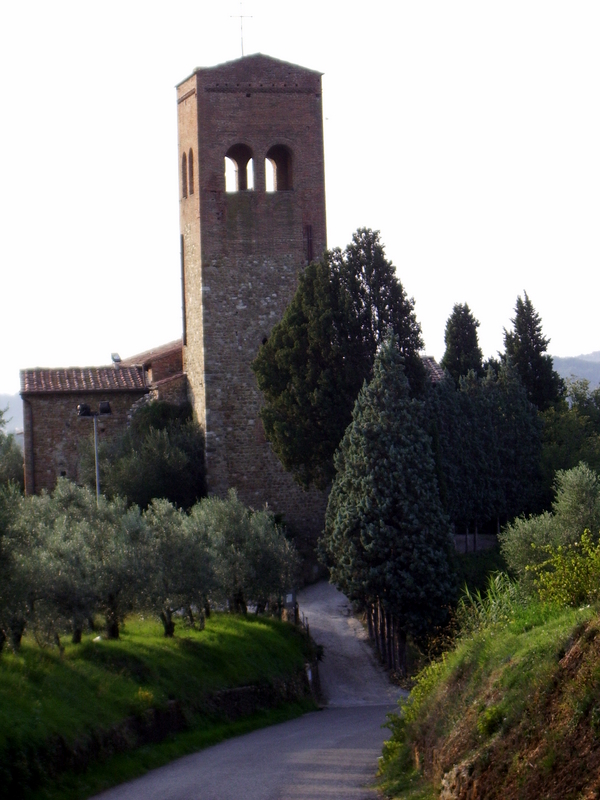 Prioria di San Lorenzo a Montelupo Fiorentino (FI)